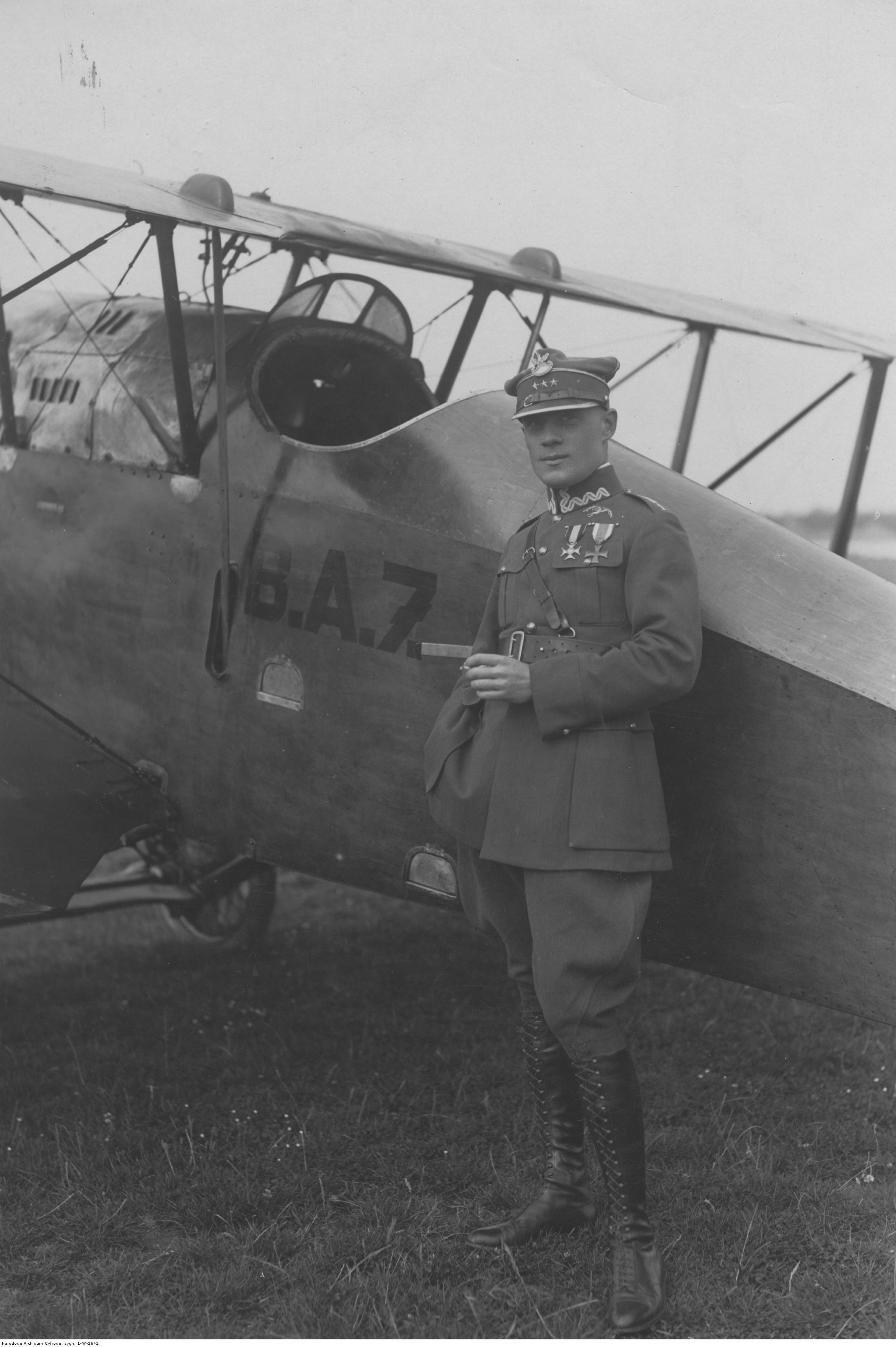 Stanisław Ratomski - kapitan pilot z 2. pułku lotniczego w Krakowie, przy samolocie Ansaldo A.1 Balilla, na którym odbył lot na trasie Kraków-Bukareszt.